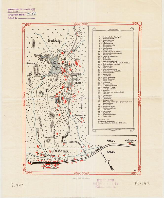 Szováta térképe. Ferenc József Tudományegyetem, Kolozsvár. C 1140. T 242. ©© Derzsi Elekes Andor, Budapest, 2014, A kép egészben, vagy részletekben másolását, bármilyen úton történő sokszorosítását és felhasználását a szerző ellenérték nélkül, jogutódjaira is kihatóan megengedi. Az engedély kiterjed a kereskedelmi célú hasznosításra is. Kéri azonban nevének feltüntetését a felhasználás során. A Metapolisz sorozat valamennyi képe és filmje Creative Commons alatti valamint kereskedelmi - for profit - célra is felhasználható. Ajánlott hivatkozás: Derzsi Elekes Andor: Metapolisz DVD line